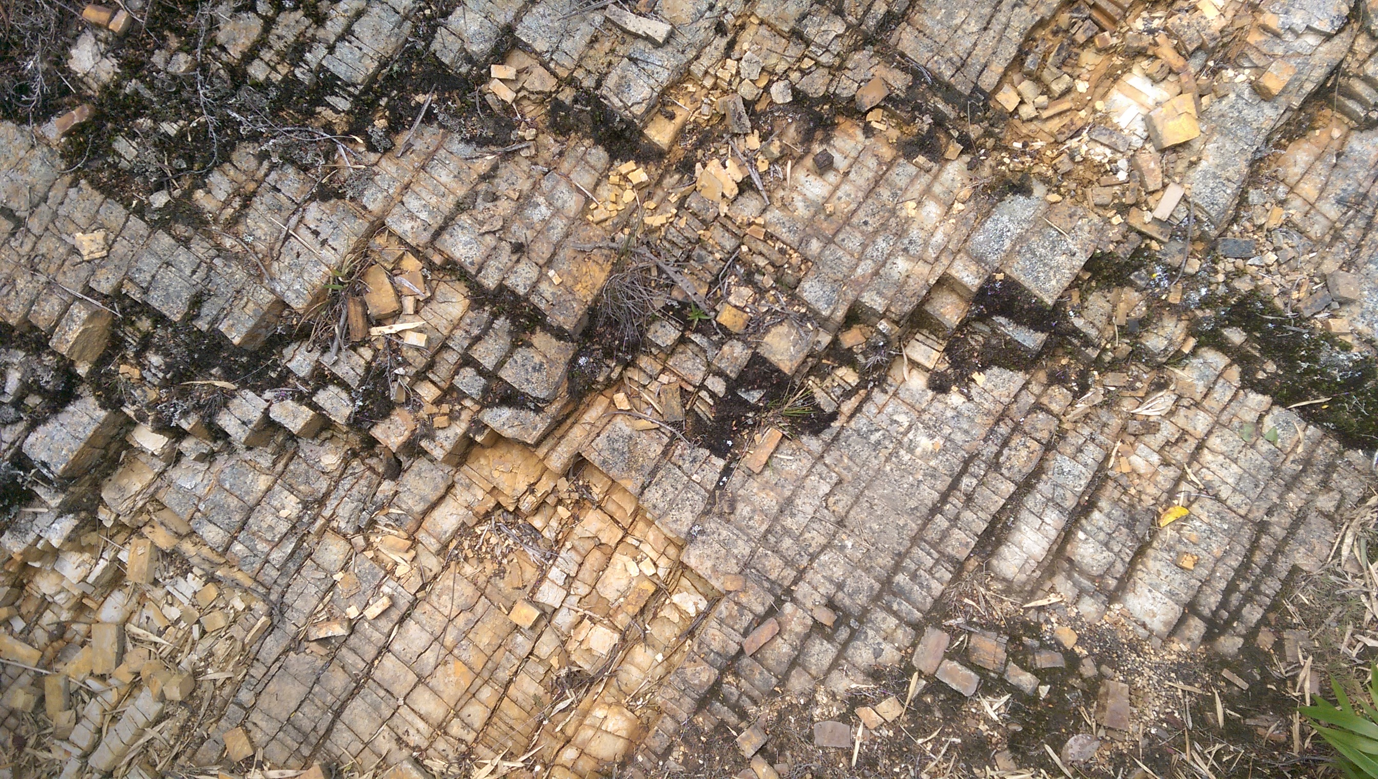 Chapinero, Bogotá, Bogota, Colombia